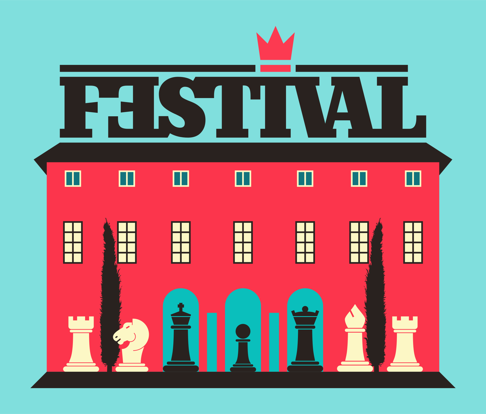 Il logo del Festival utilizzato a partire dalla 30ª edizione (2018).